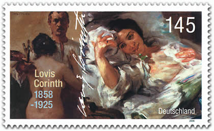 Briefmarke der Deutschen Post AG, 150. Geburtstag des Malers Lovis Corinth (1858-1925), Selbstbildnis mit Modell, 1902 und Morgensonne, 1910